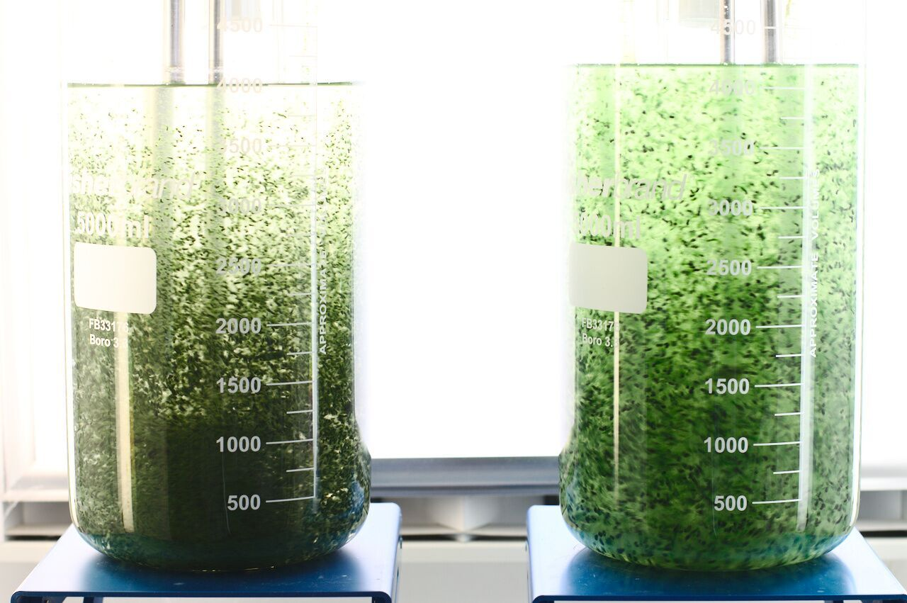 SBR Reactor, with Oxygenic photogranules